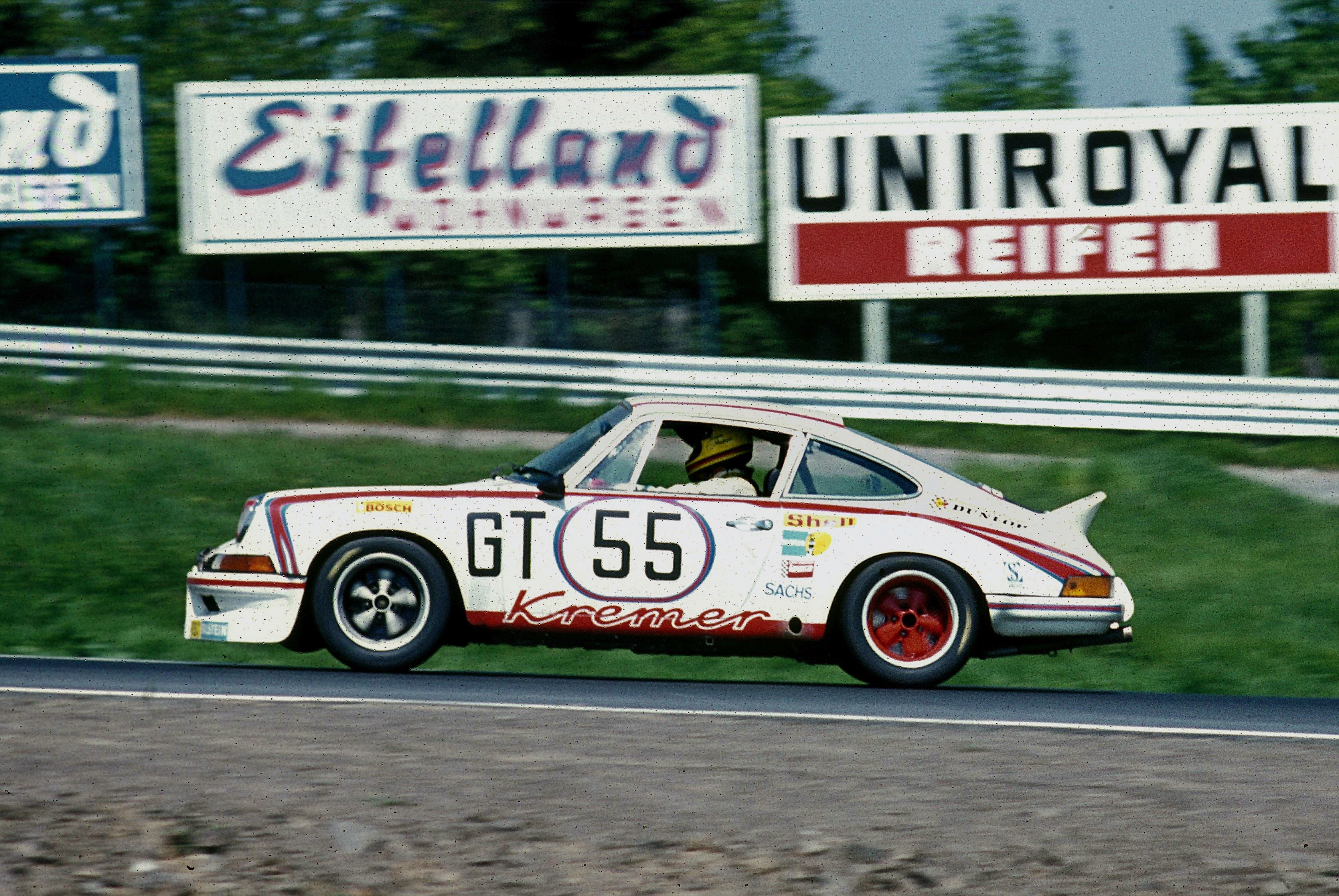 Jürgen Neuhaus im Porsche Carrera RSR beim 1000-km-Rennen auf dem Nürburgring, zwischen Nordkurve und Hatzenbach